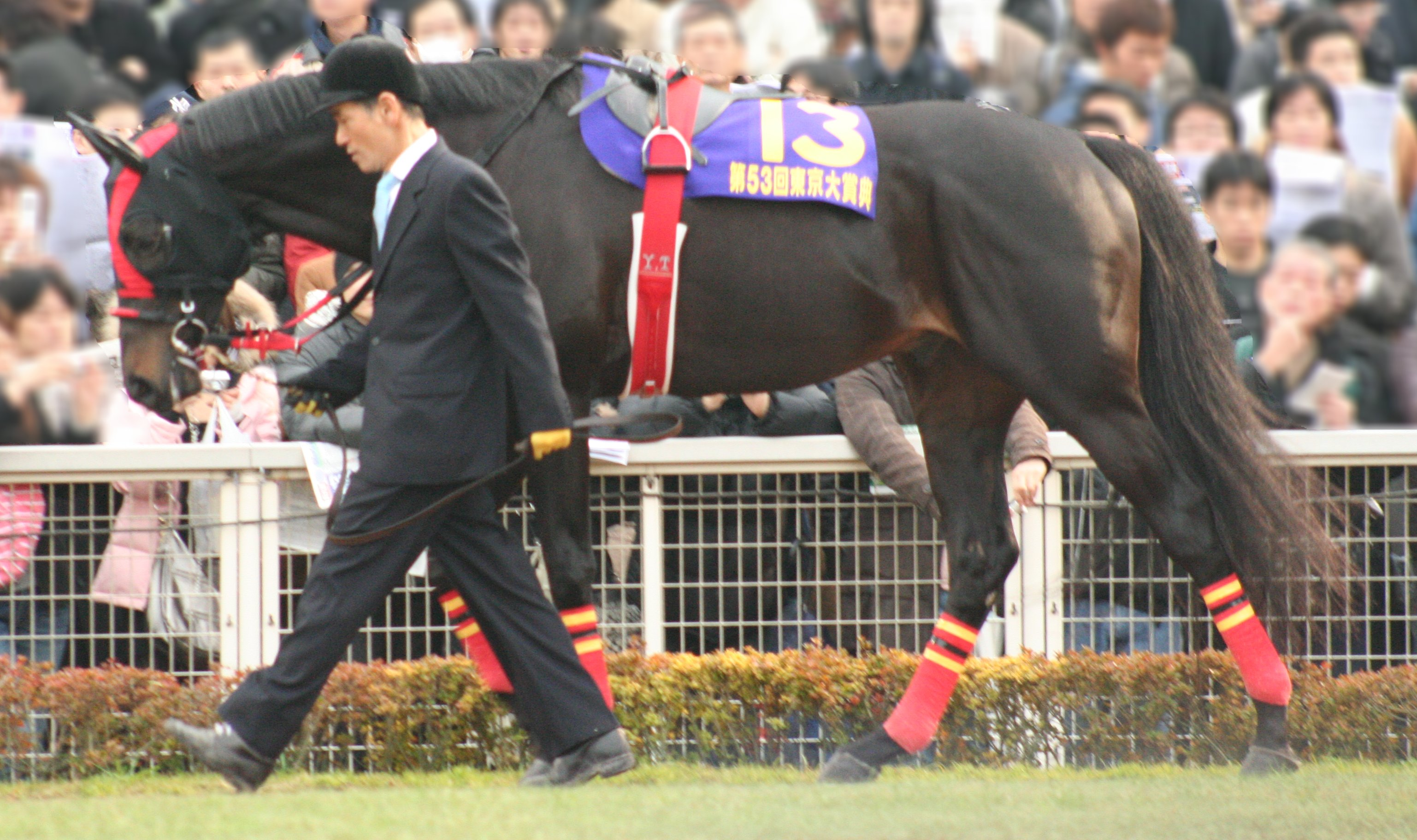 Vermilion (horse) ヴァーミリアン